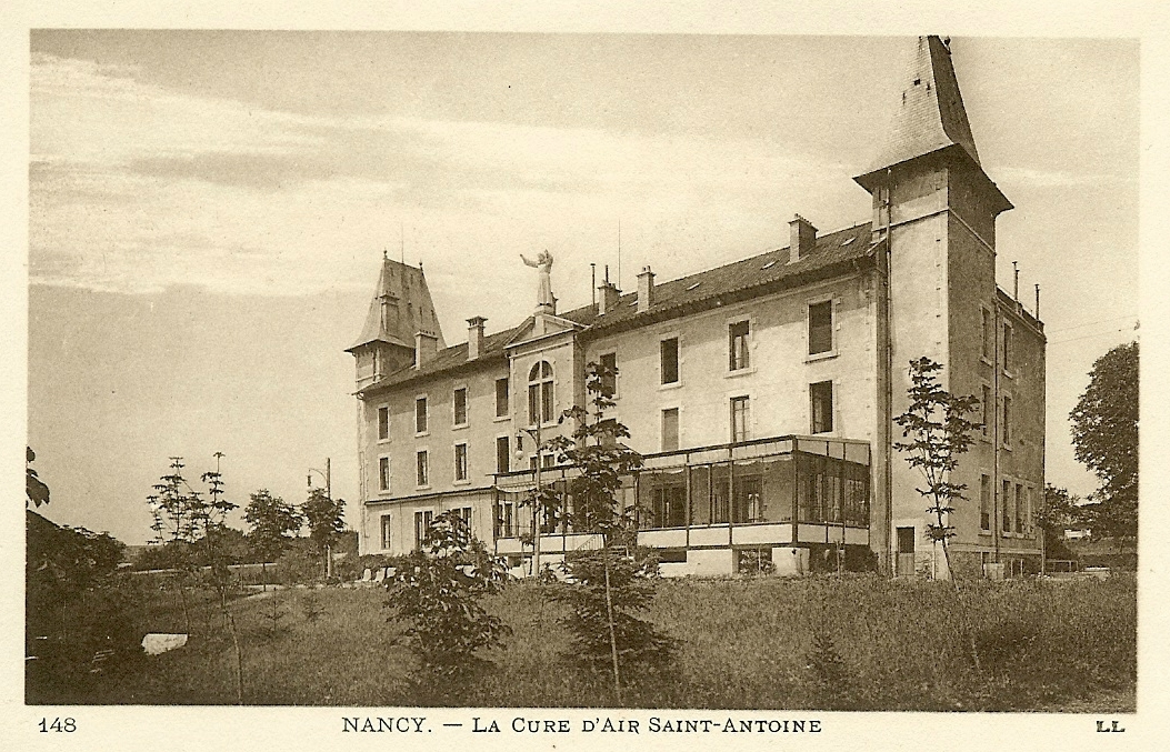 Carte postale ancienne éditée par LL, n° 148, présentant le bâtiment de la Cure d'air Saint-Antoine à Nancy vers 1905.